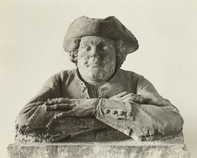 Sandsteinsculptur Hoftaschenspieler Gottfried Schmiedel vom hist. Landstallamt in Moritzburg bei Dresden